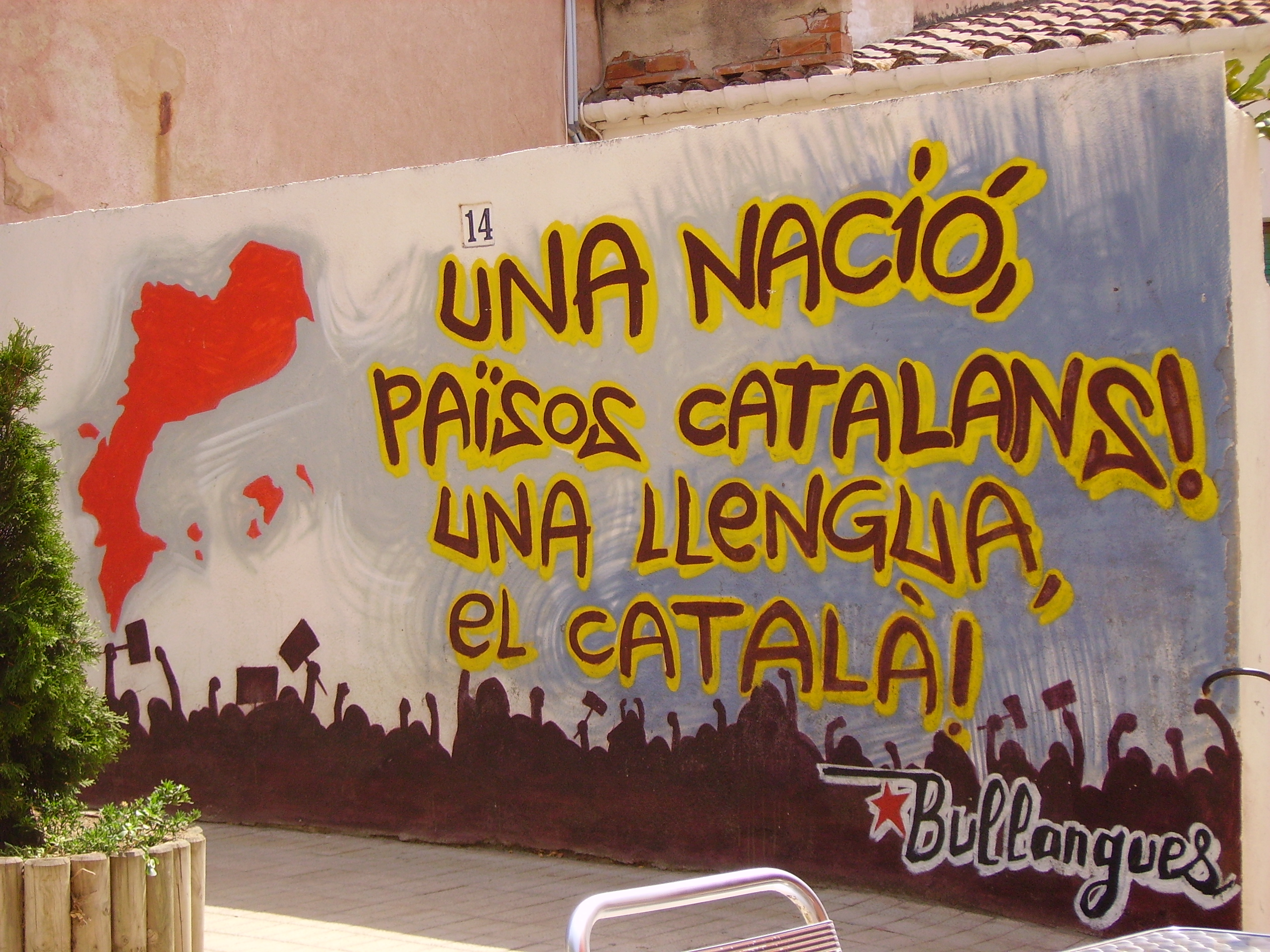 Mural a Vilassar de Mar, El Maresme, Catalunya.